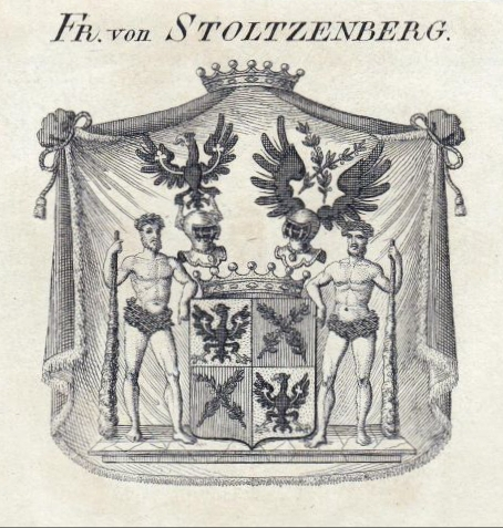 Wappen derer Freiherren von Stoltzenberg (morganatische Nebenlinie derer Markgrafen von Brandenburg-Schwedt, Prinzen von Preußen).